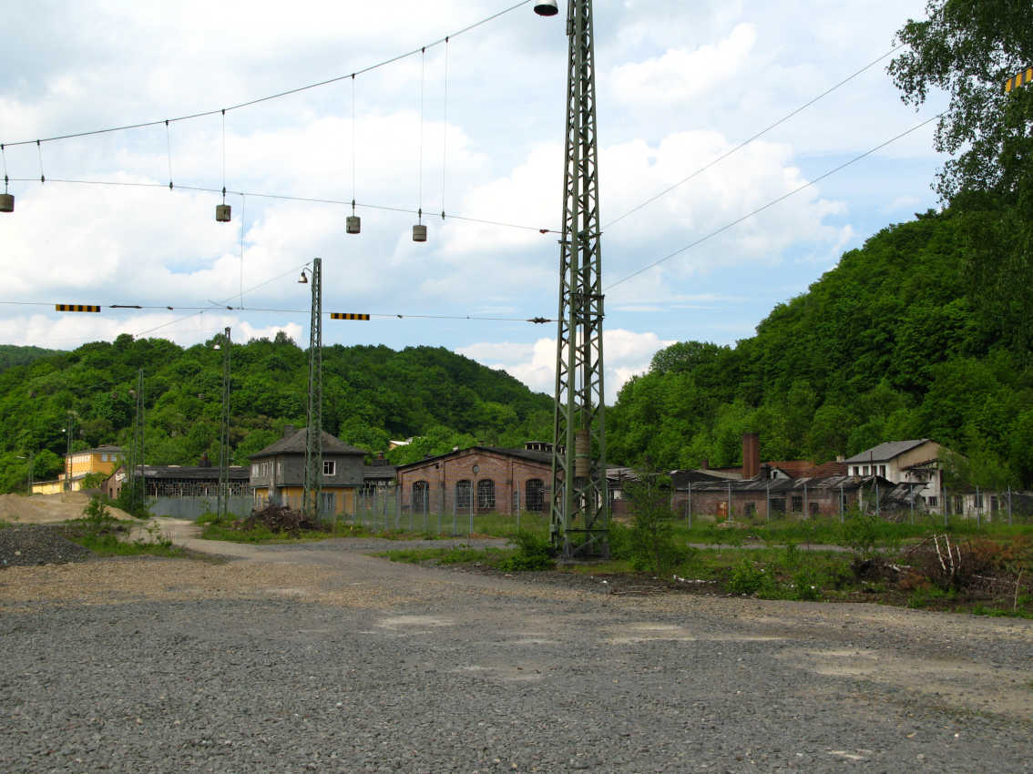 Gelände des ehemealigen Bw Dillenburg 2008